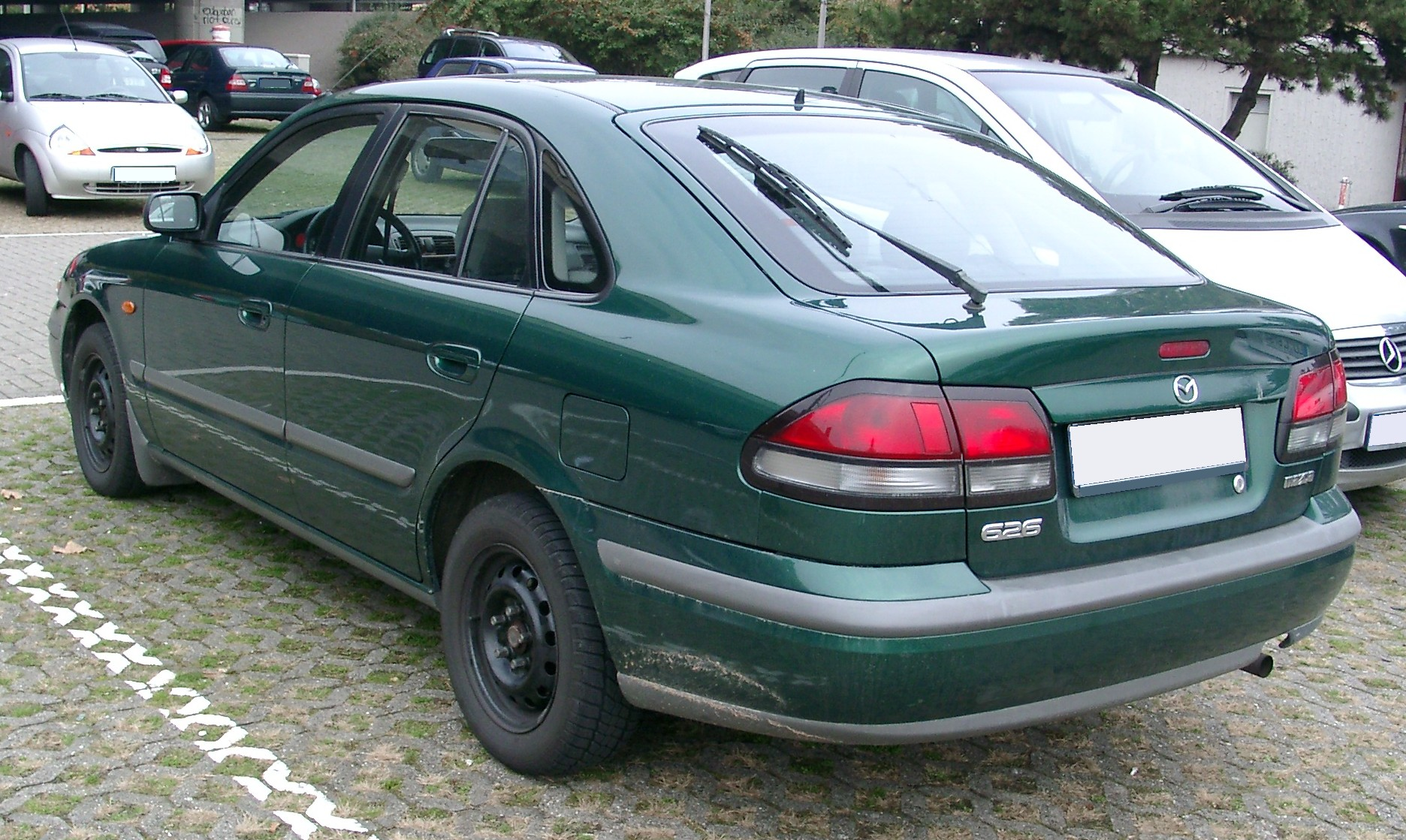 Mazda 626, 5. Generation